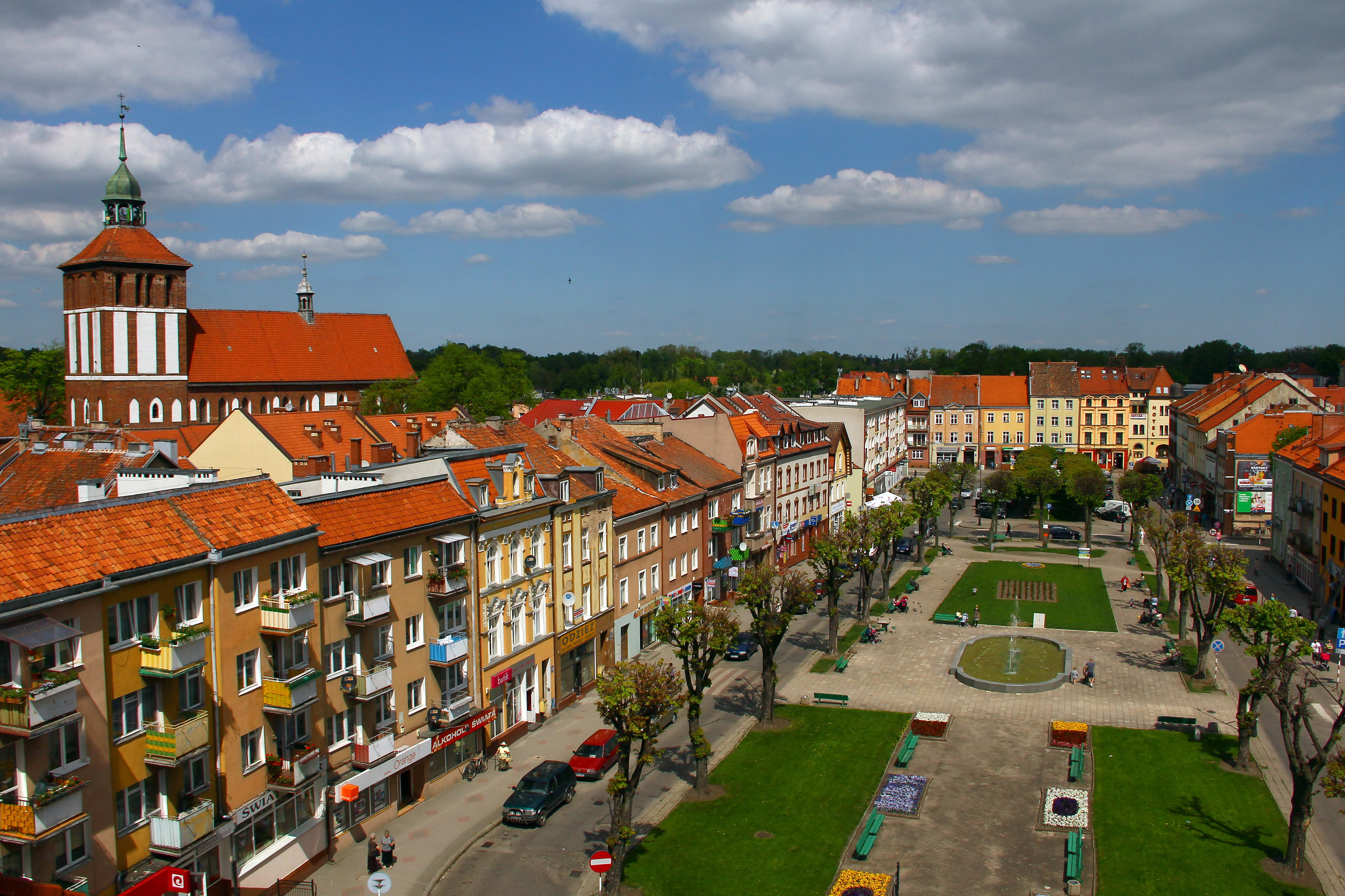 Bartoszyce. Plac Konstytucji 3 Maja (Rynek) i kościół farny św. Jana Ewangelisty i MB Częstochowskiej.